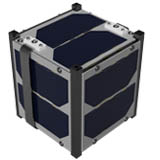 El primer Cubesat guatemalteco.